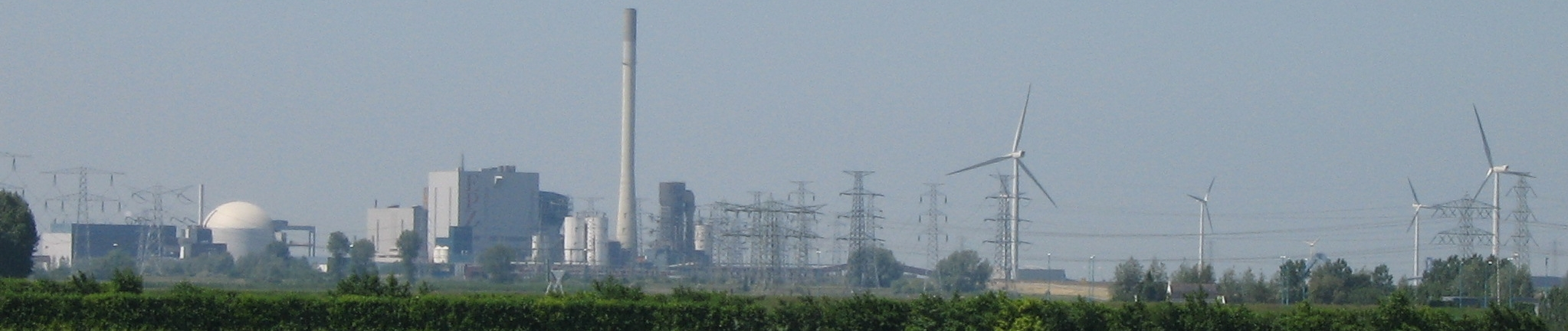 Aevegebied Vlissege-Oôst en de kerncentraole van Bossele. Havengebied Vlissinegn-Oost met de Borsselse kerncentrale. Vlissingen Seaport and Borssele nuclear power plant (only nuclear power plant in the Netherlands).